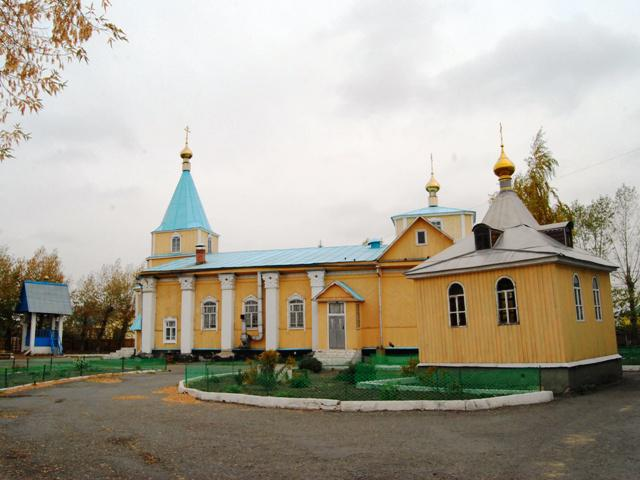 Kurgan.Pro